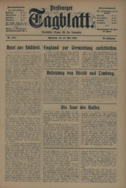 Titulný list denníka Pressburger Tagblatt, ktorý vychádzal na Slovensku do r. 1924.